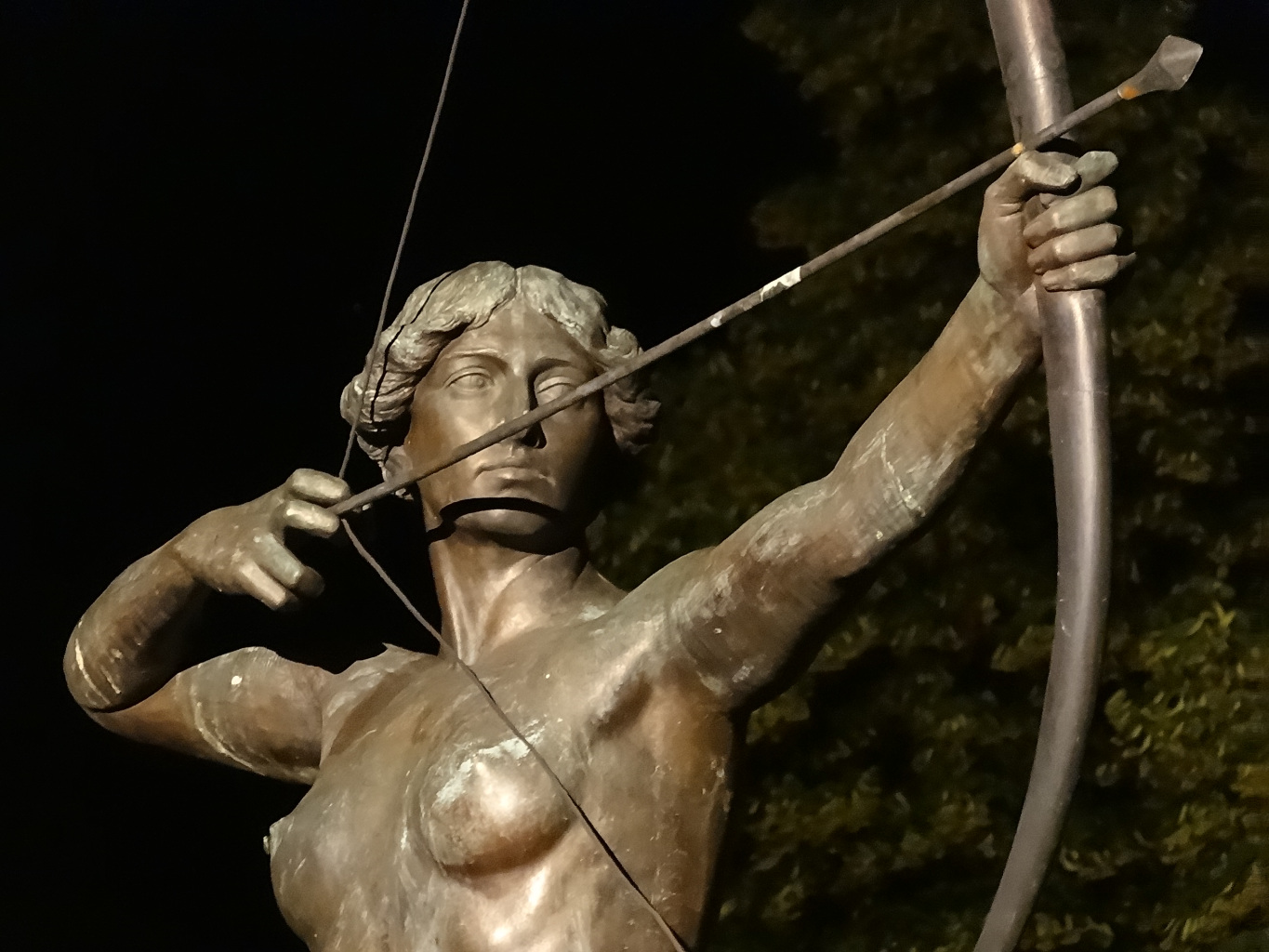 Rzeźba Łuczniczki utorstwa prof. Ferdinanda Lepcke odsłonięta w 1910 r. w Bydgoszczy